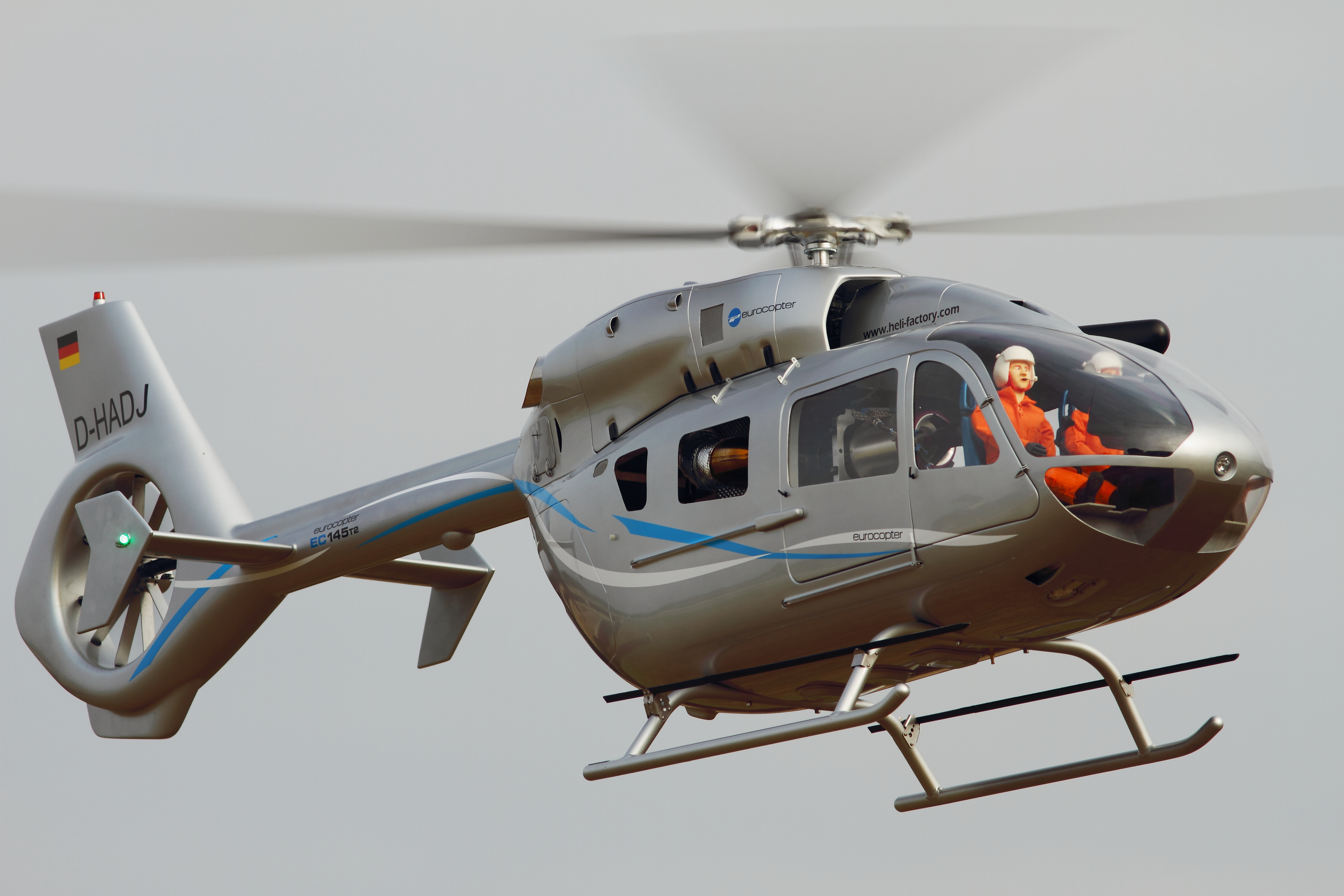 Vorbildähnliches RC-Hubschraubermodell EC135-T2 mit Turbine